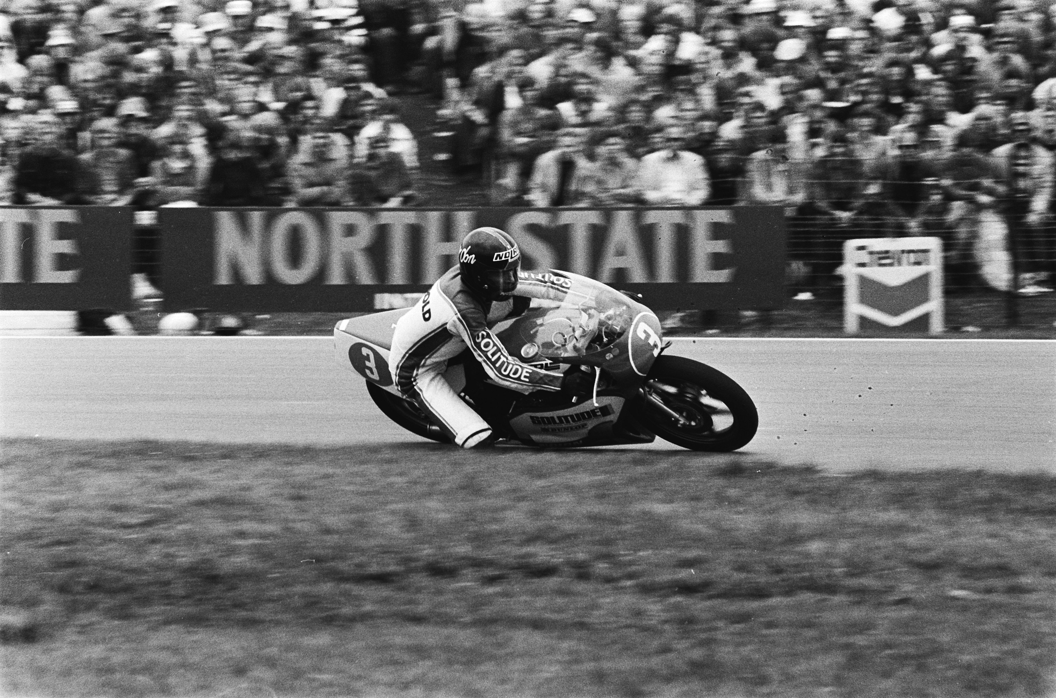 Collectie / Archief : Fotocollectie Anefo Reportage / Serie : TT Assen 1980 Beschrijving : TT Assen ; Jon Ekerold in aktie, winnaar 350 cc Datum : 28 juni 1980 Locatie : Assen Trefwoorden : motorcoureurs, motorfietsen, motorraces, motorsport, sport Persoonsnaam : Ekerold, Jon Instellingsnaam : TT Fotograaf : Pereira, Fernando / Anefo Auteursrechthebbende : Nationaal Archief Materiaalsoort : Negatief (zwart/wit) Nummer archiefinventaris : bekijk toegang 2.24.01.05 Bestanddeelnummer : 930-9049